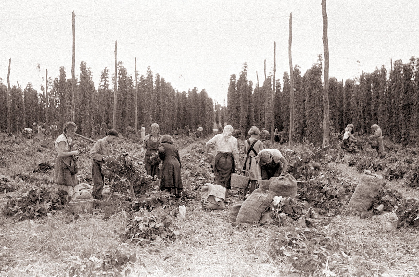 Obiralci na KG Kidričevo v Hajdošah med obiranjem hmelja.